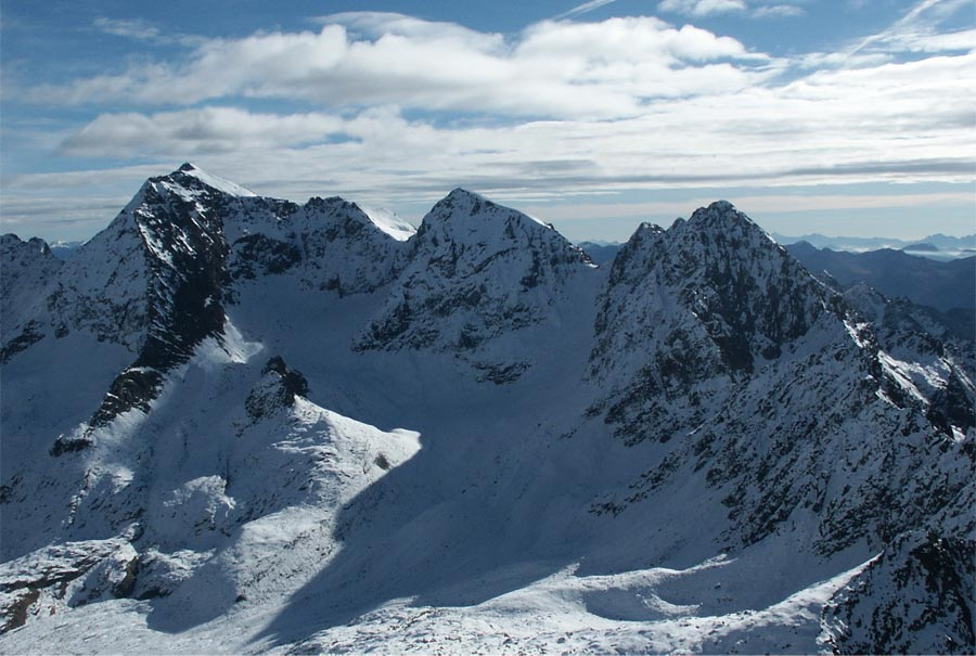 Der Petzeck links und rechts davon Kruckelkopf und Hoher Perschitzkopf Left to right, peak names and heights. Petzeck - 3283 m Kruckelkopf - 3181 m Hoher Perschitzkopf - 3125 m